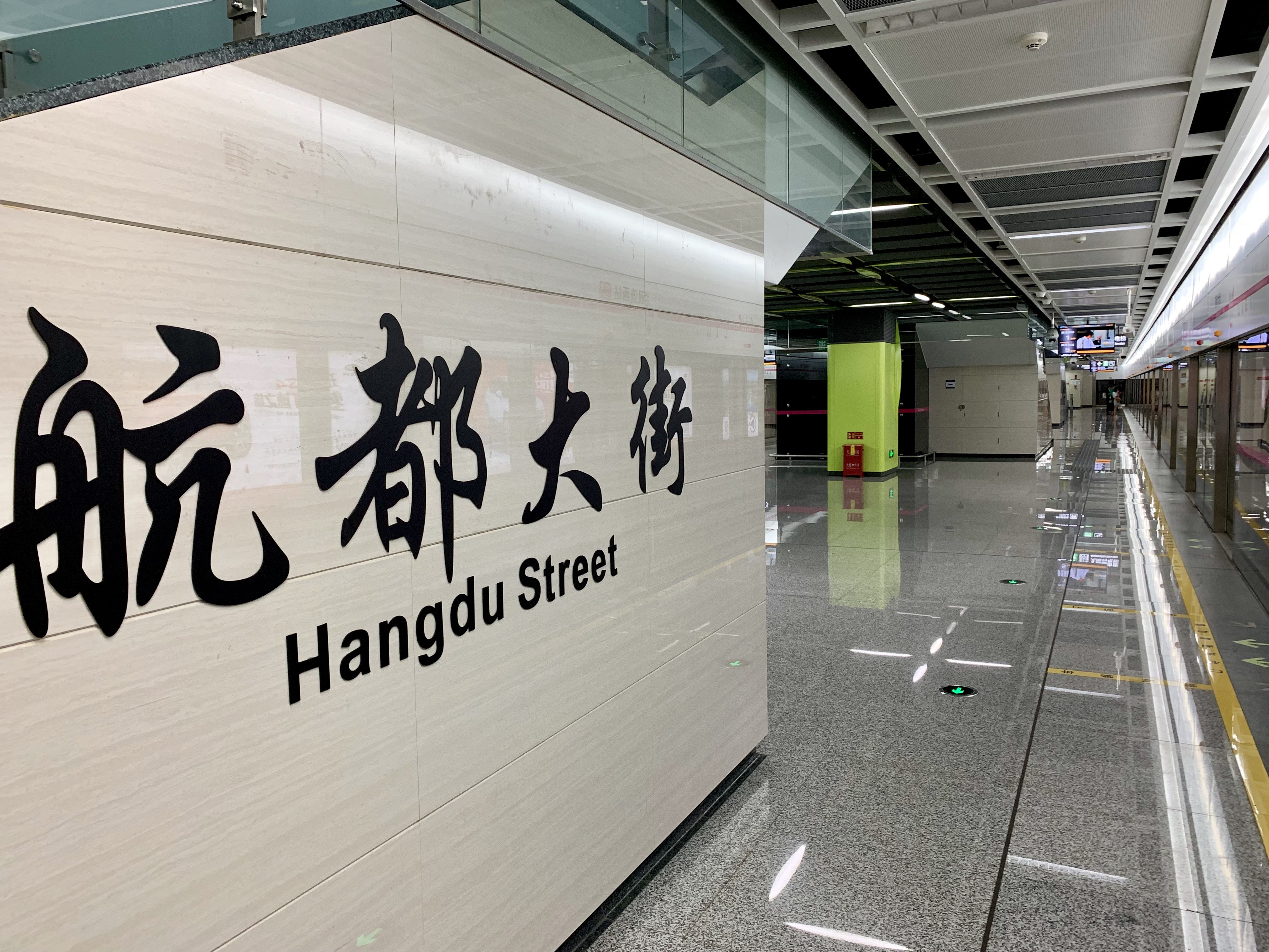 成都地铁航都大道站